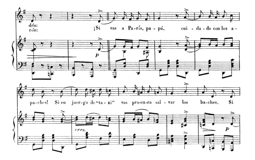 Fragmento de la canción Si vas a París papá, ejemplo de one_step. Imagen: Lourdes Cardenal. Enero de 2004. Brought from Imagen:One step lou.jpg and taken by my husband.